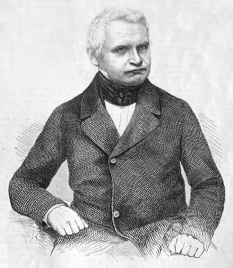 Carl Moltke (15. november 1798- 12. april 1866) var en dansk greve embedsmand og kortvarigt geheimestatsminister i 1848 under Frederik 7. Han var minister uden portefølge i Ministeriet Moltke III. Minister for Slesvig fra 1852-54 under ministerierne Ministeriet Bluhme I og Ministeriet Ørsted, og igen minister uden portefølge i 1864 under Ministeriet Bluhme II.